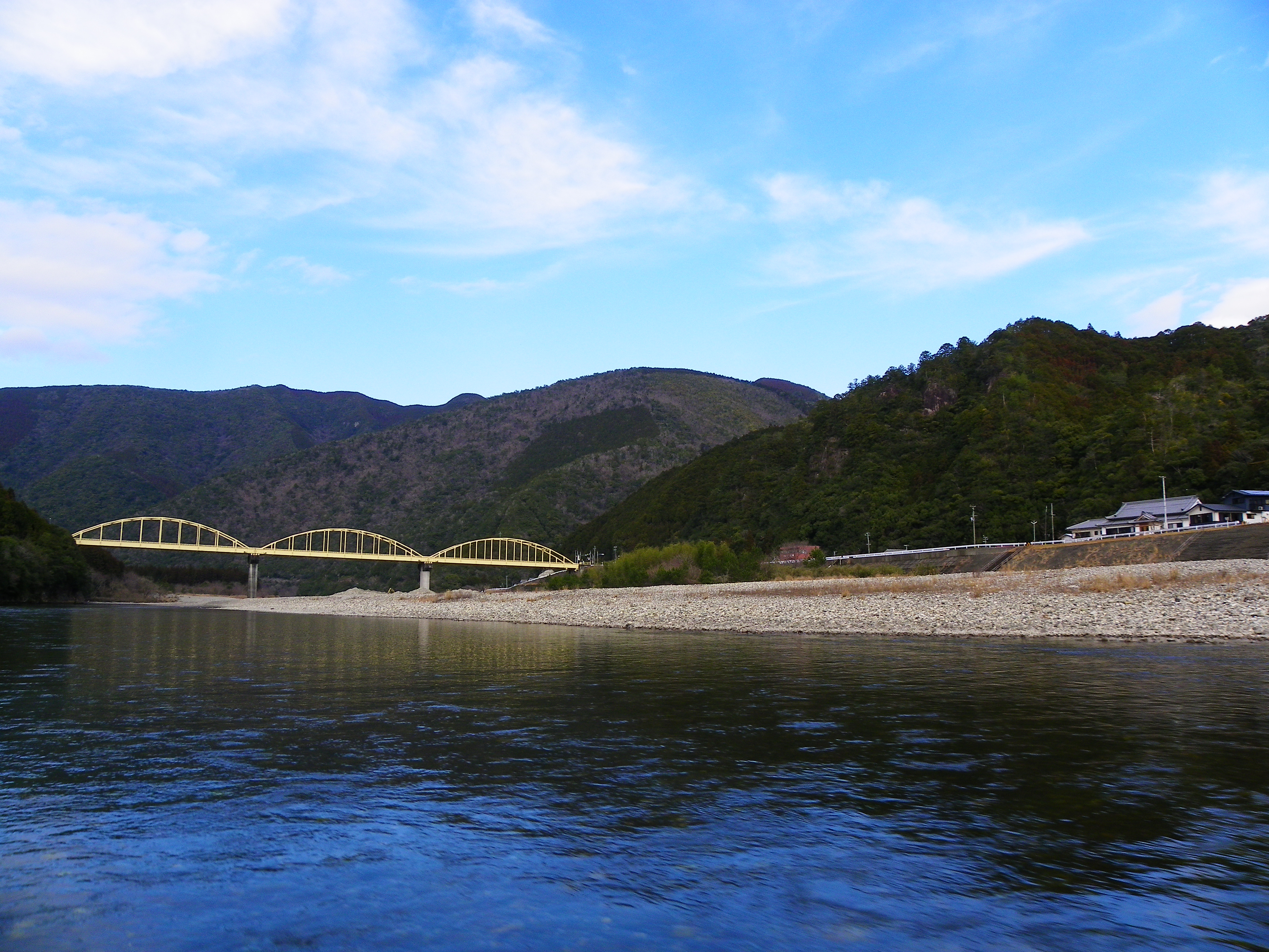 和歌山県新宮市（旧熊野川町嶋津）と三重県熊野市（旧紀和町小川口）の間、北山川に架かる国道311号の瀞大橋。右手前は瀞流荘。